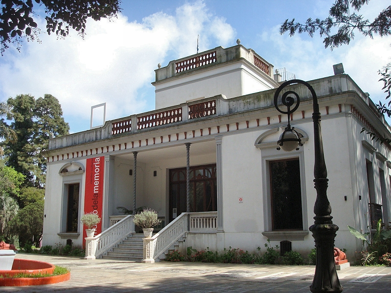 Museo de la Memoria, Paso de las Duranas, Montevideo, Uruguay.